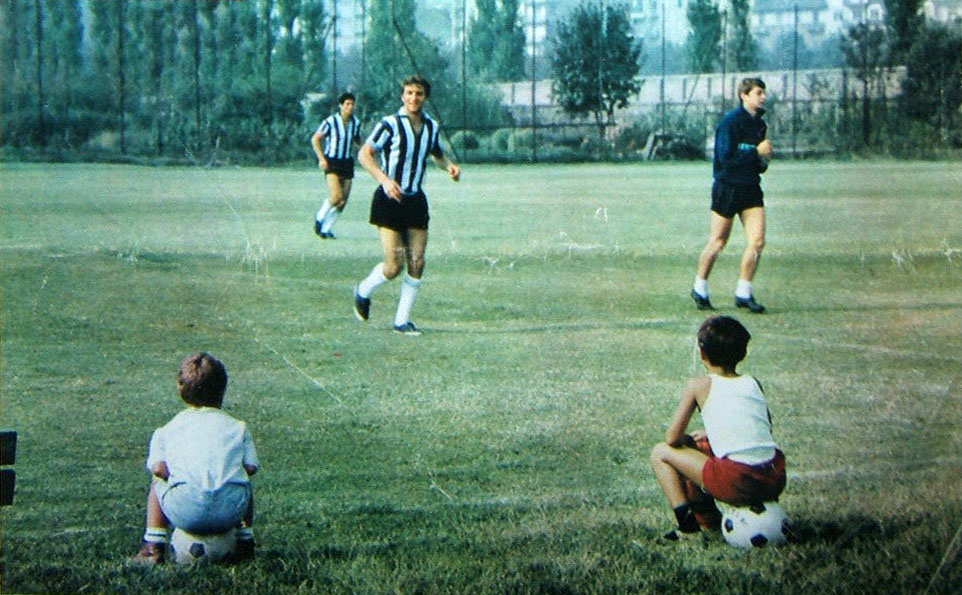 Torino. I calciatori della Juventus in allenamento al Campo Combi all'inizio della stagione 1967-68.